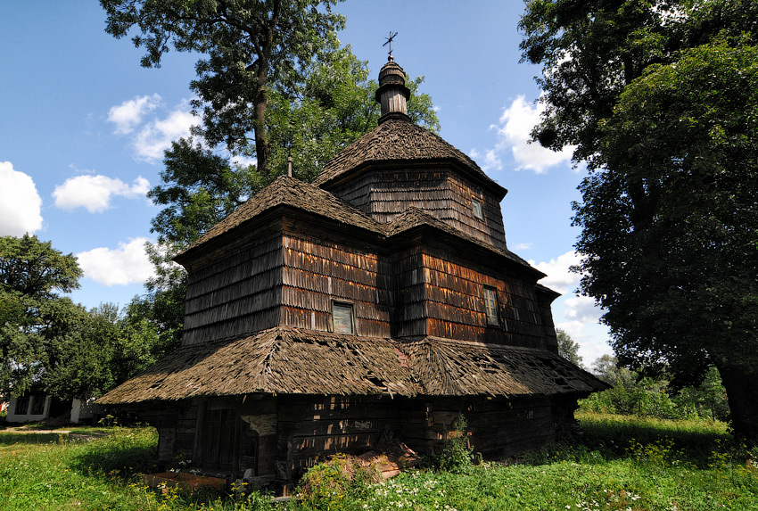 Церква св. Микити в Дернові